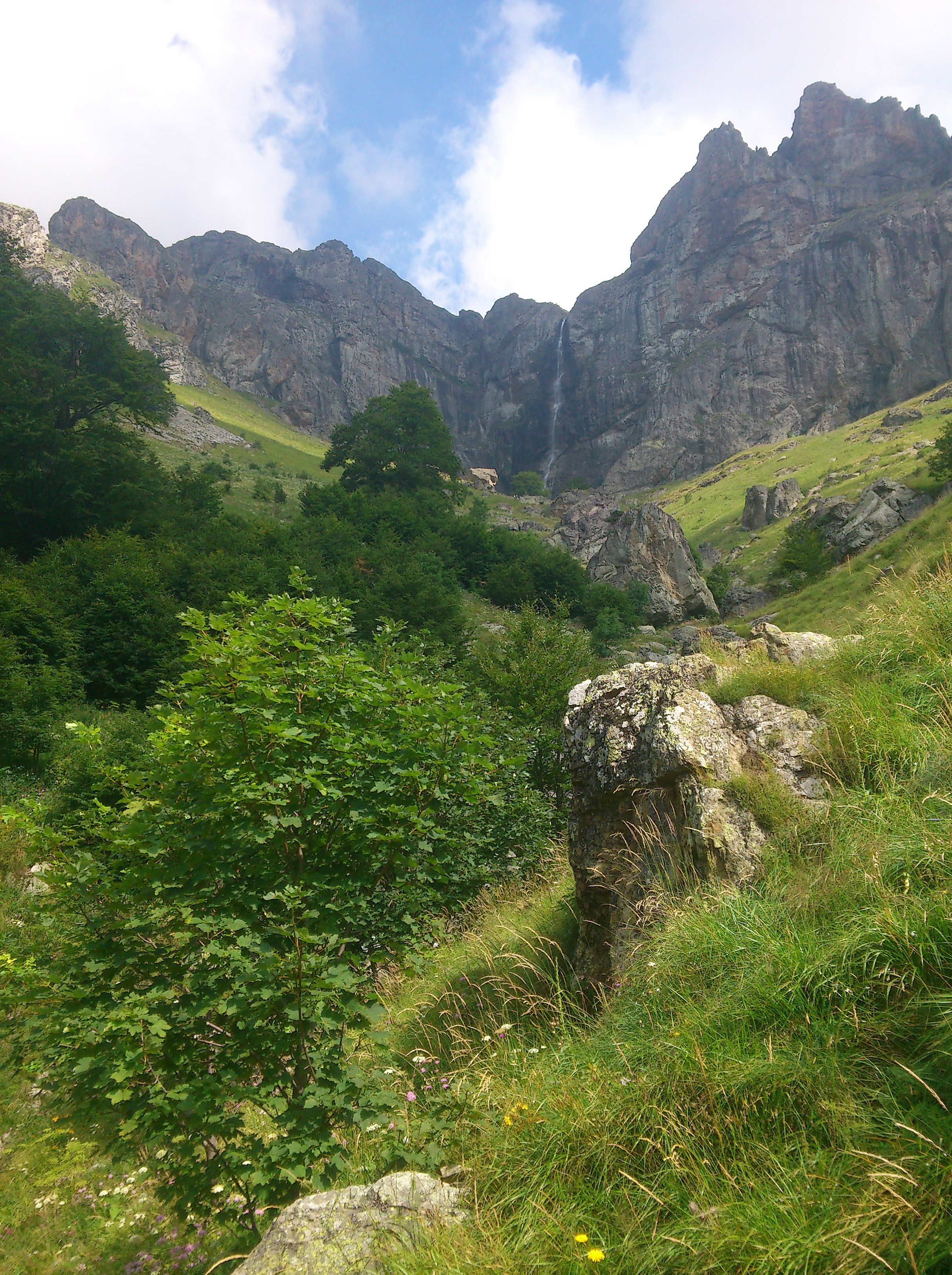 Централен Балкан, Стара планина